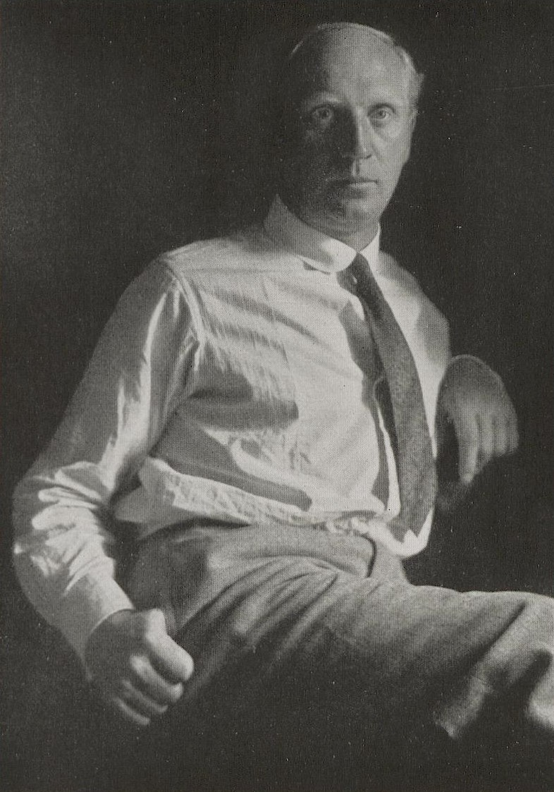 Portrait des Malers Theo Champion c. 1932